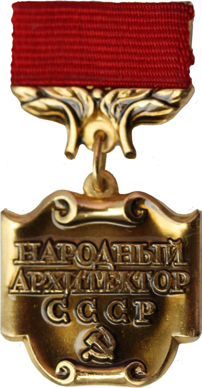 Знак «Народный архитектор СССР»